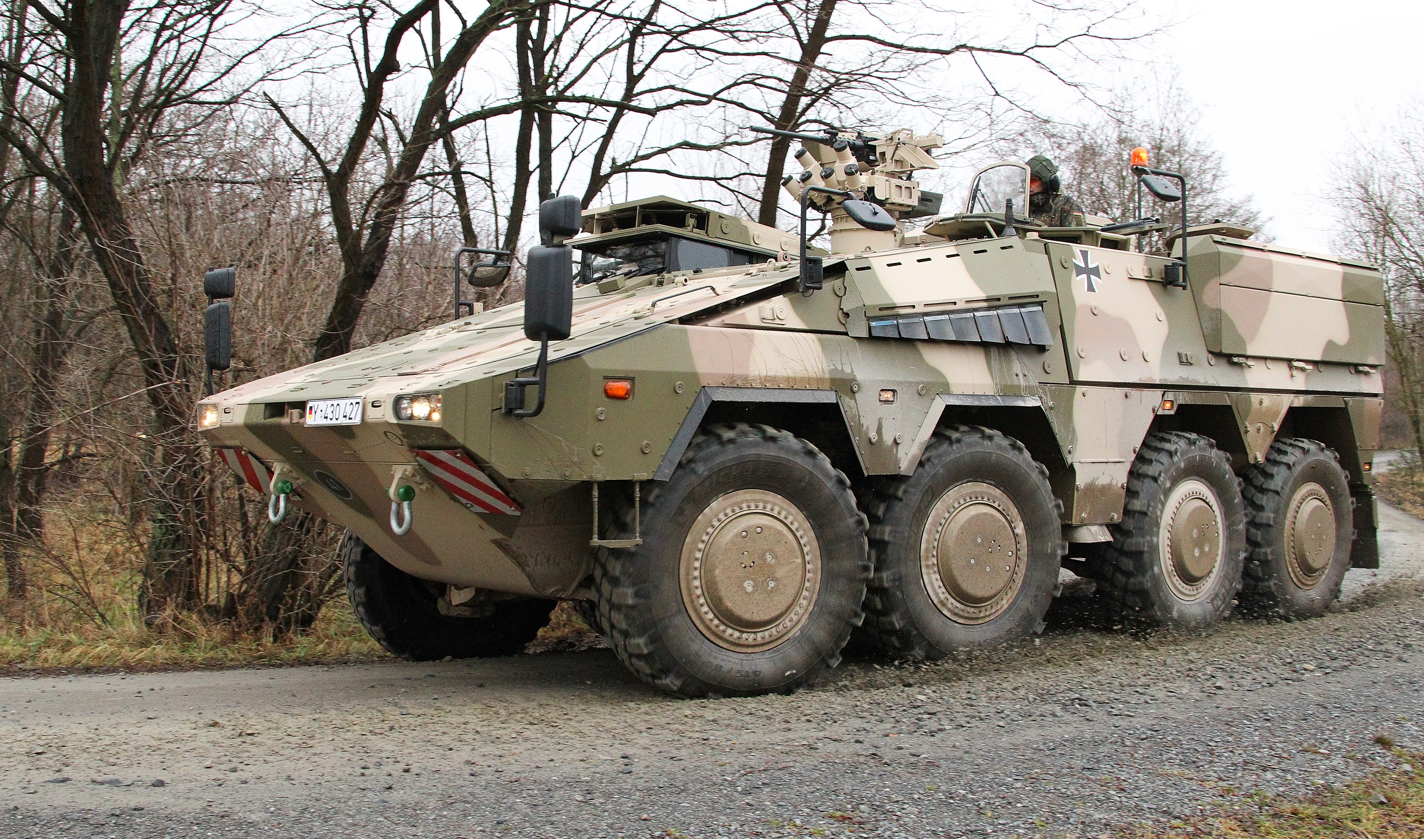 Im Materiallager Zeithain wird der GTK Boxer für seinen Einsatz in Afghanistan vorbereitet. Bewegungsfahrt des GTK Boxer. Mit dem GTK Boxer wurde eine neue Generation gepanzerter Transportfahrzeuge mittlerer Gewichtsklasse entwickelt. Deren besonderes Merkmal liegt in der Erfüllung von Einzelforderungen auf zukunftsweisendem Niveau und in der ausgewogenen Abstimmung konkurrierender Anforderungen. Die Fahrzeugfamilie GTK Boxer wurde modular entworfen und nutzt ein gemeinsames Basisfahrzeug, das aus einem Fahrmodul und einem Missionsmodul besteht. Dieses Basisfahrzeug bildet die Grundlage für jede Fahrzeugversion/ -variante oder -modifikation. Das Fahrmodul umfasst den vollständigen Antriebsstrang und alle Antriebskomponenten, den Fahrerplatz, wichtige Unterstützungskomponenten wie die ABC-Schutzeinrichtung, die Klimaanlage, die Brandunterdrückungsanlage für den Motorraum und alle Schnittstellen zum Missionsmodul. © Bundeswehr / Mandt